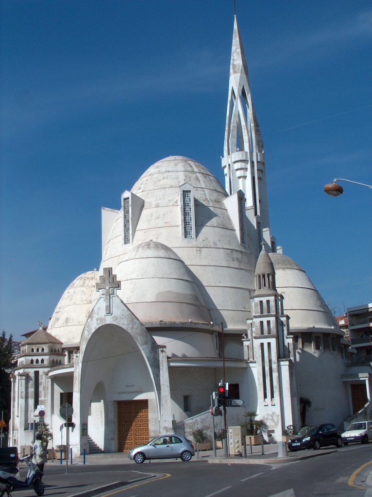 Sainte Jeanne d'Arc